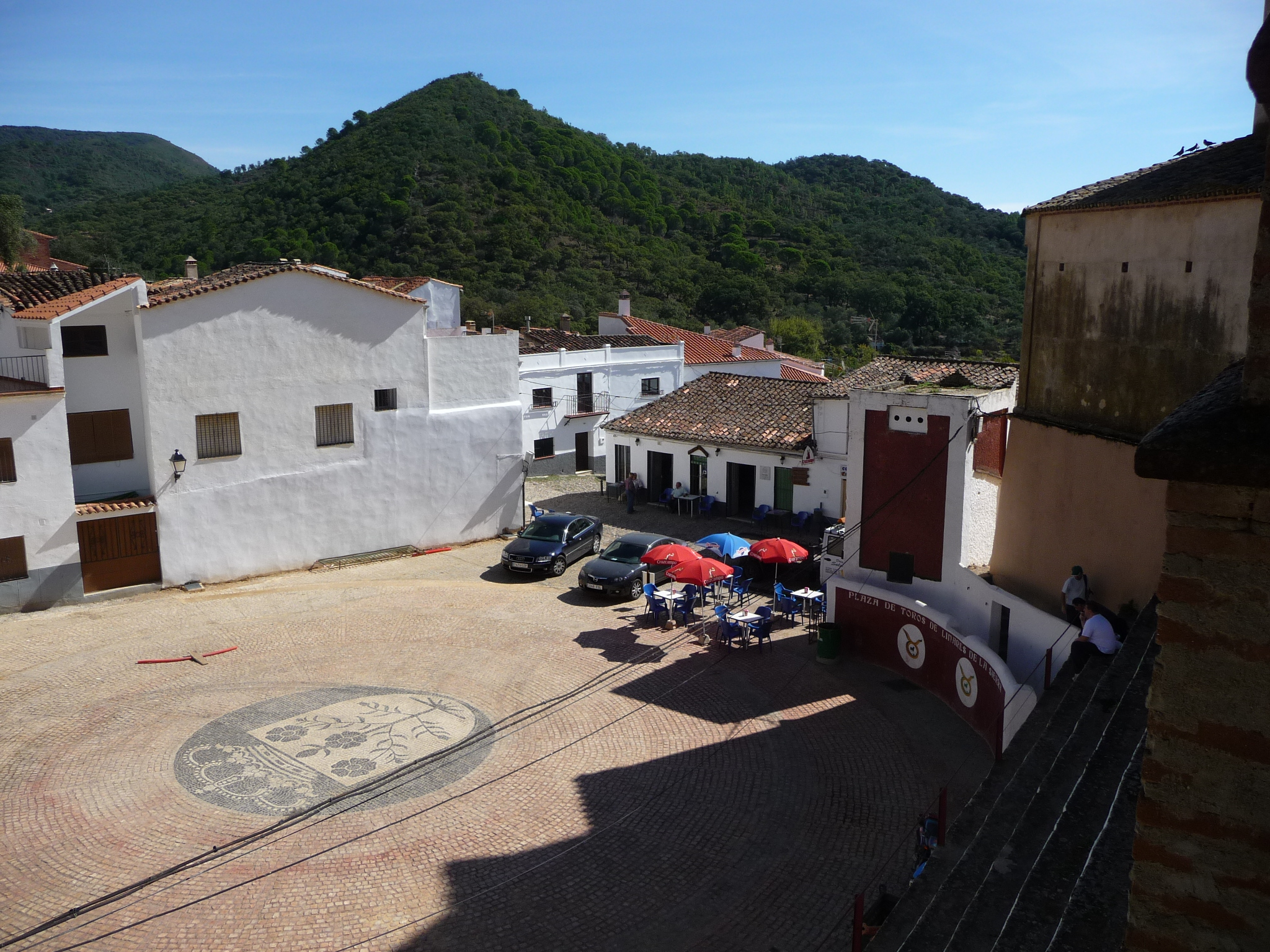 LinaresDeLaSierra-P1040721.JPG